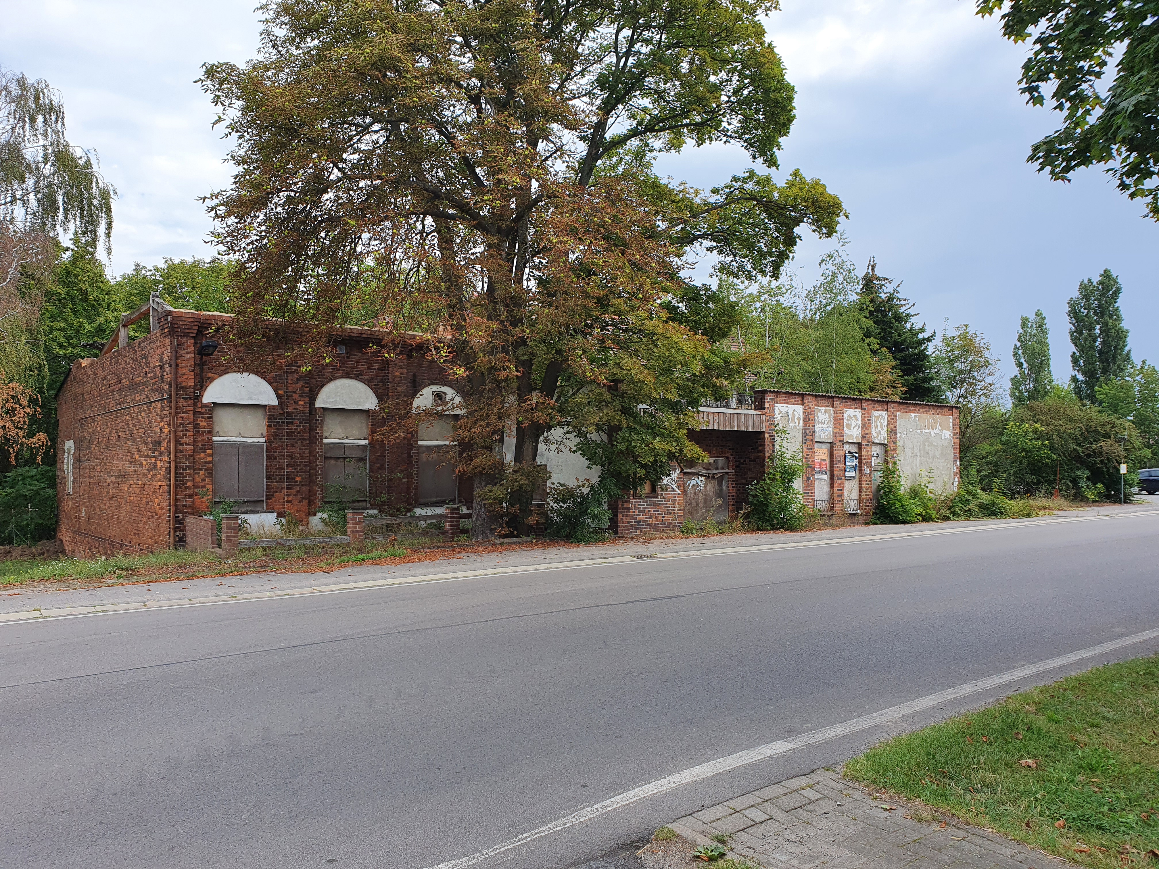 Historischer Dorfkrug von Göritz, einem heutigen Ortsteil der Stadt Vetschau im Landkreis Oberspreewald-Lausitz in Brandenburg. Das Gebäude ist heute verfallen.